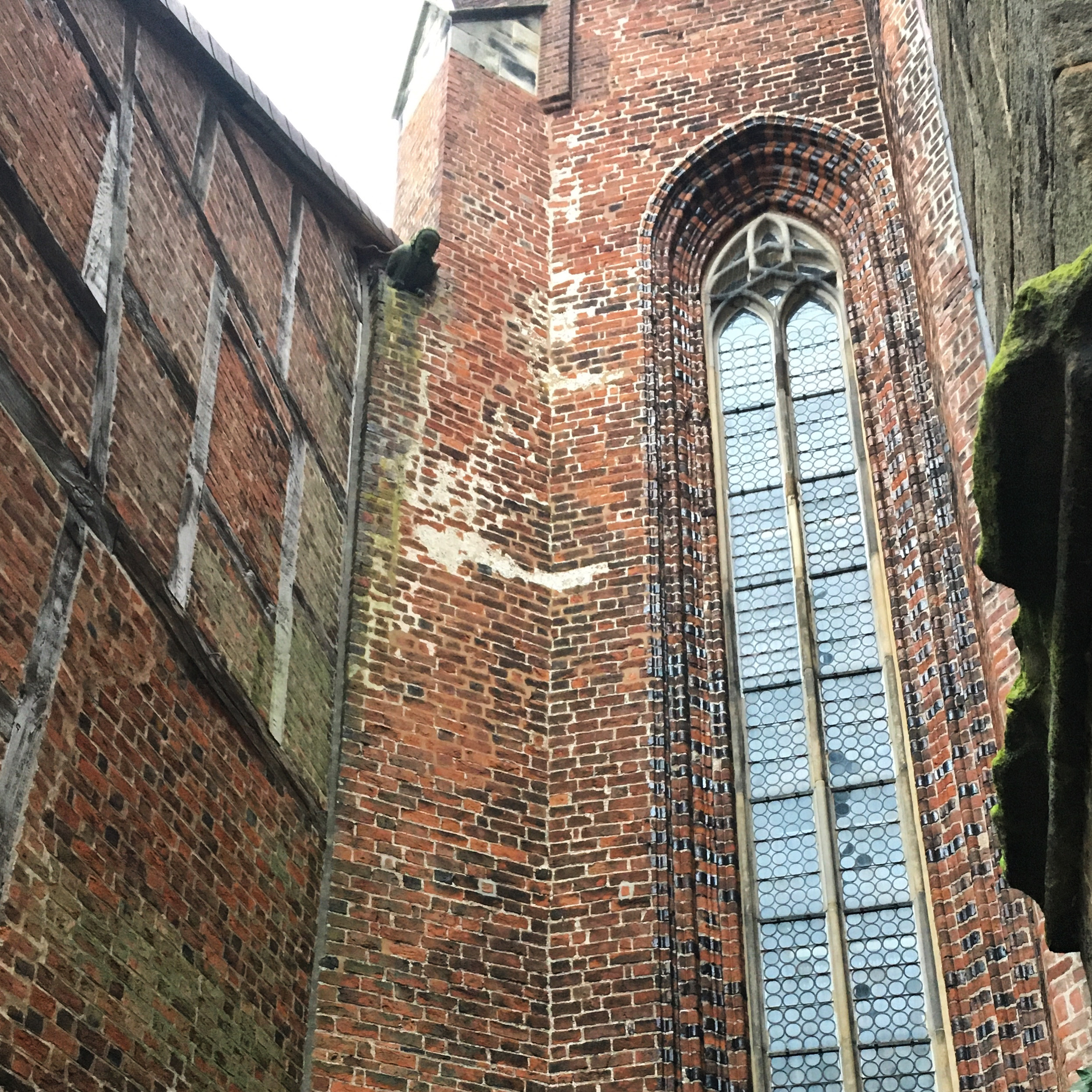 Figut des steinernen Manns an einer Außenmauer des Doms zu Verden